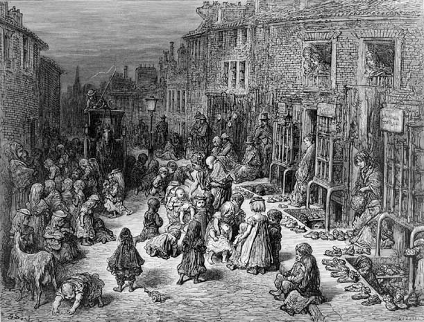 Engraving, "Seven Dials" by Gustave Doré, 1872.